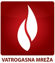 Logo Vatrogasne mreže